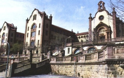 Patronat Ribas, a Vall d'Hebron 93-103 (1920-1930), obra de l'arquitecte Enric Sagnier. Fet gràcies a la donació testamentària de Lluís Ribas i Regordosa. És un conjunt d'edificis estructurat amb enginy, articulat amb naus en forma d'H, simètriques a l'eix de la capella. La seva decoració remet a un estil populista barroc, destacant els relleus en terracota de tradició catalana. Actualment acull un institut d'educació secundària (IES Carles Riba)